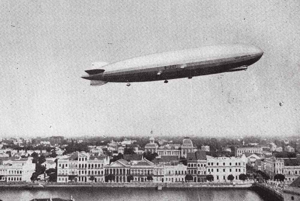 Graf Zeppelin (LZ-127) sobrevoando a Rua da Aurora, na cidade do Recife, capital de Pernambuco, Brasil, na década de 1930.